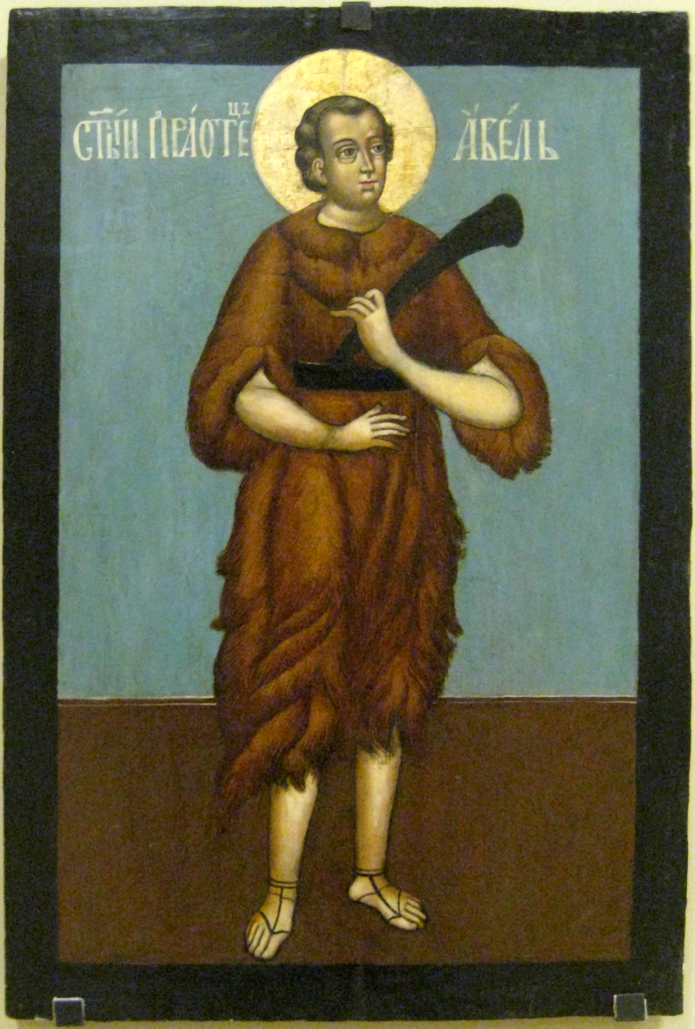 Праотец Авель. 1-я треть 18 века. Происхождение не установлено. Приобретена у Ф. Копелевича (Москва) в 2008 году. Реставрированна А.А. Бринцевым (МНРХУ) до поступления в колелкцию.